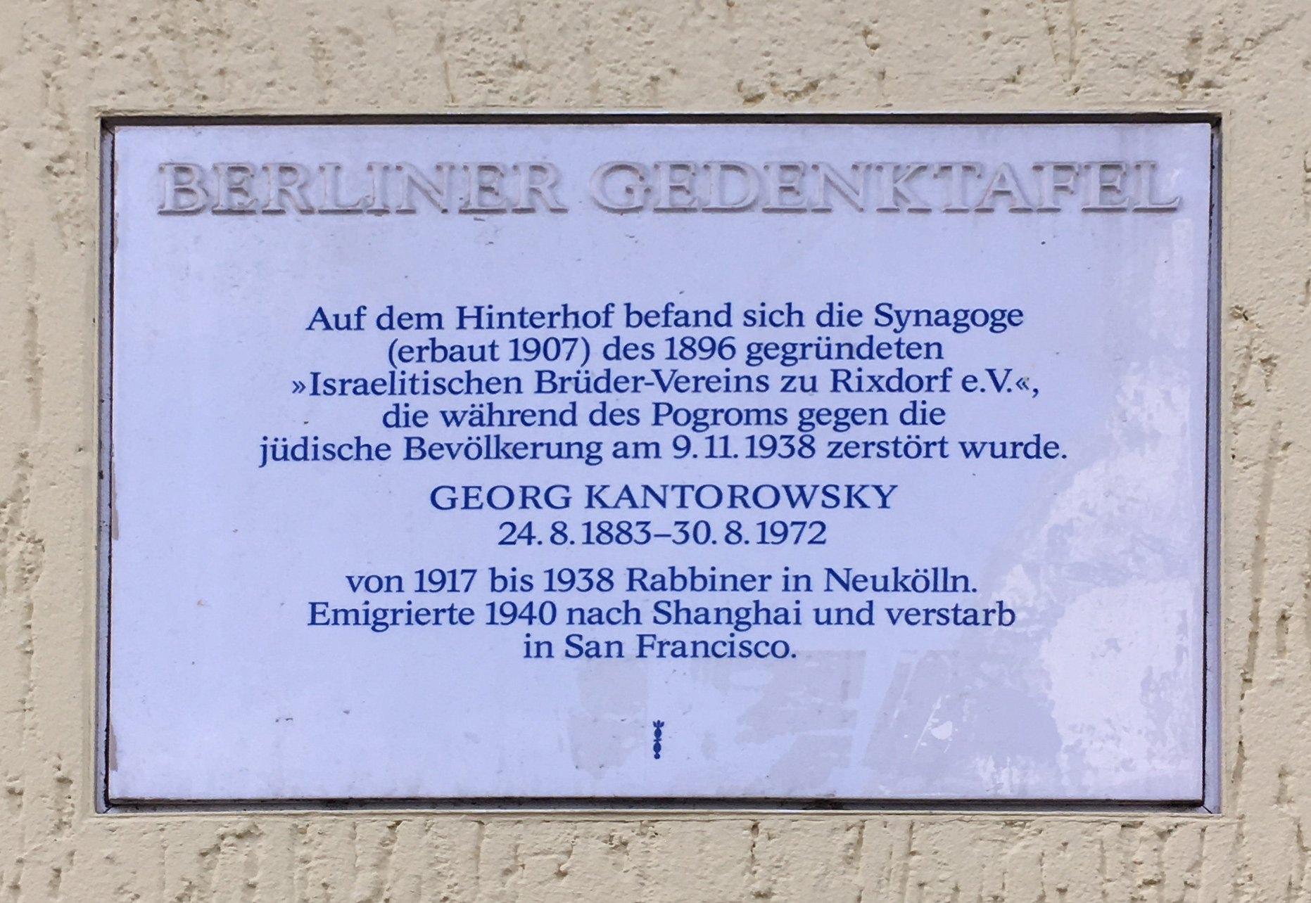 Gedenktafel der zerstörten Synagoge in der Isarstraße Berlin.